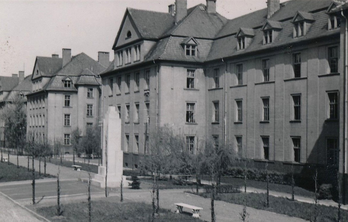 Pomnik Józefa Piłsudskiego w Koszarach Saperów w Poznaniu, ul. Rolna (nieistniejący)